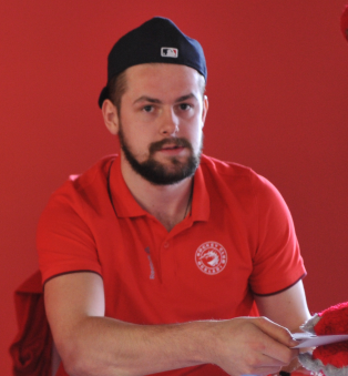 Po zakončení sezóny 2016/17 na autogramiádě ve Werk Areně